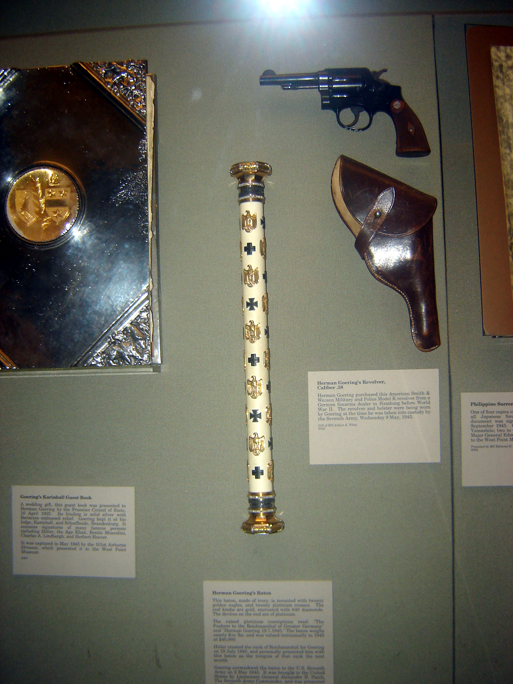 Hermann Göring's baton, revolver, and guestbook from his residence at Carinhall